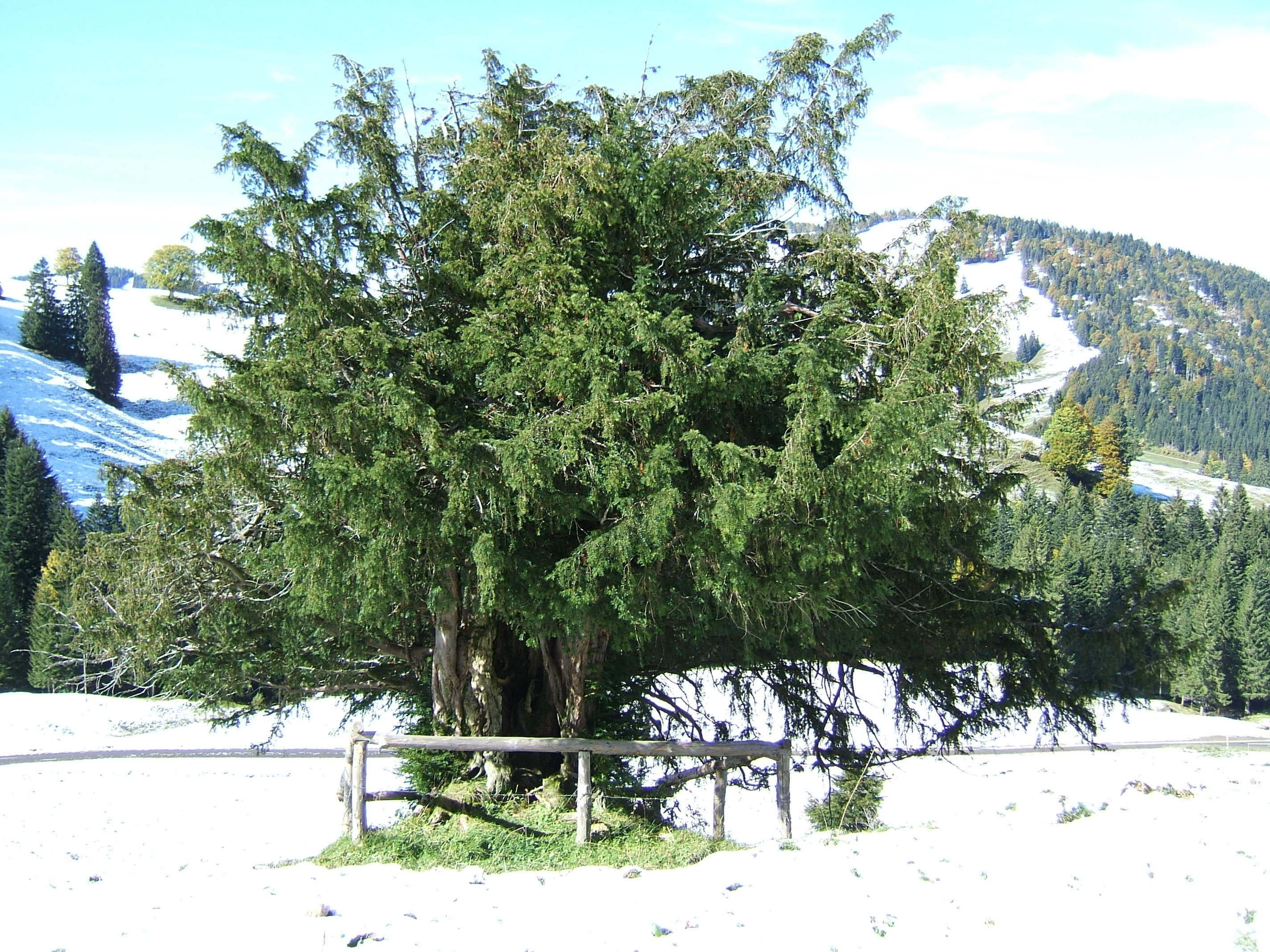 Ureibe bei Steibis, Hangoberseite